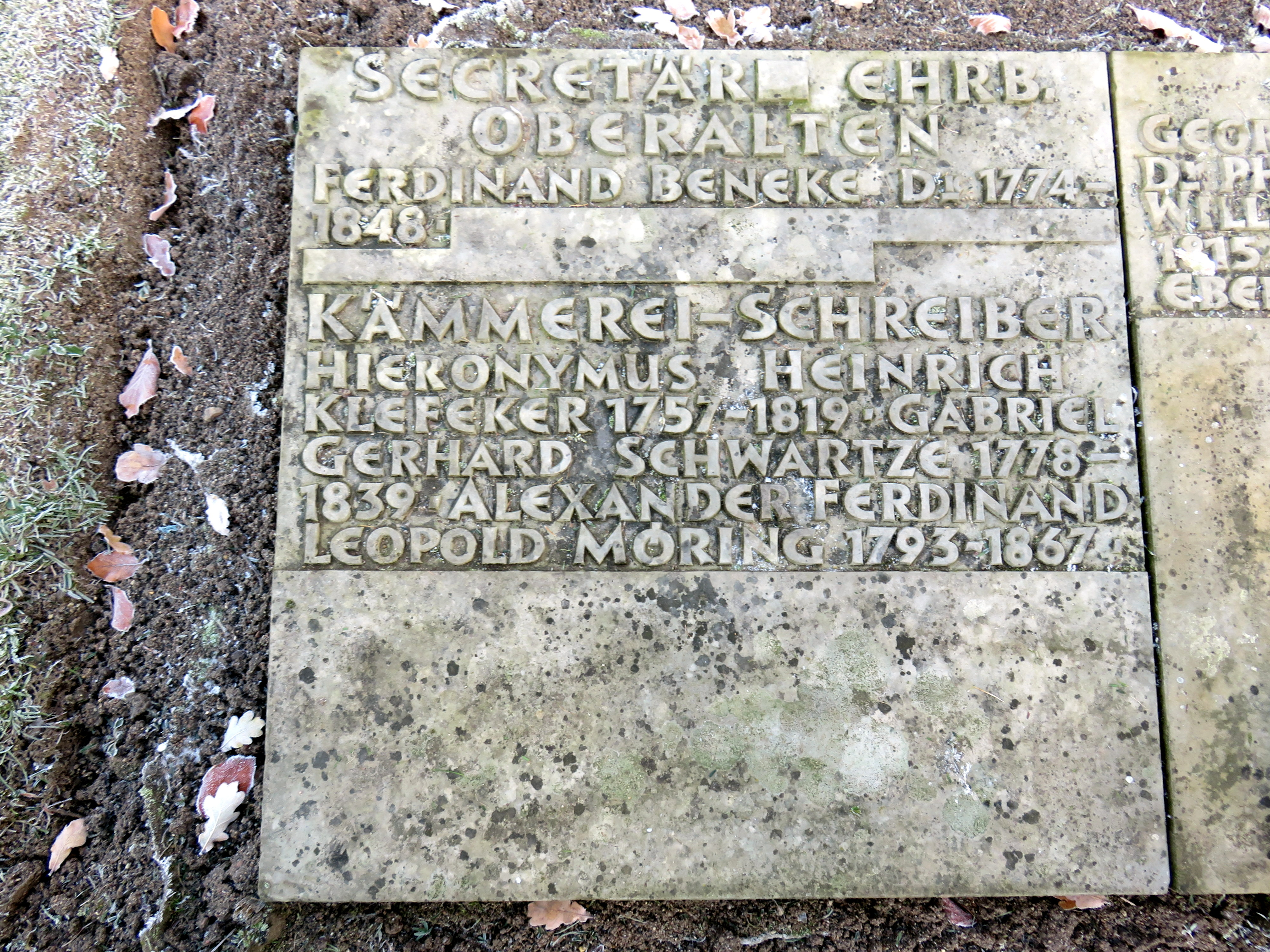 Inschrift auf dem Sammelgrabmal Secretair Ehrb. Oberalten zu Ehren des Hamburger Juristen und Freiheitskämpfers Ferdinand Beneke während der Napoleonischen Kriege, Bereich Althamburgischen Gedächtnisfriedhof, Hamburger Friedhof Ohlsdorf, Wegekreuzung.